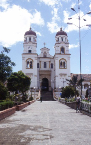 Iglesia de San Jacinto (Guasca, Cund., Colombia) Esta foto fue tomada por mi persona, Hugo Zambrano, la misma persona que la subió a Wikipedia. No ha sido usada en otro lugar público. Declaró que la doy bajo la licencia GFDL.